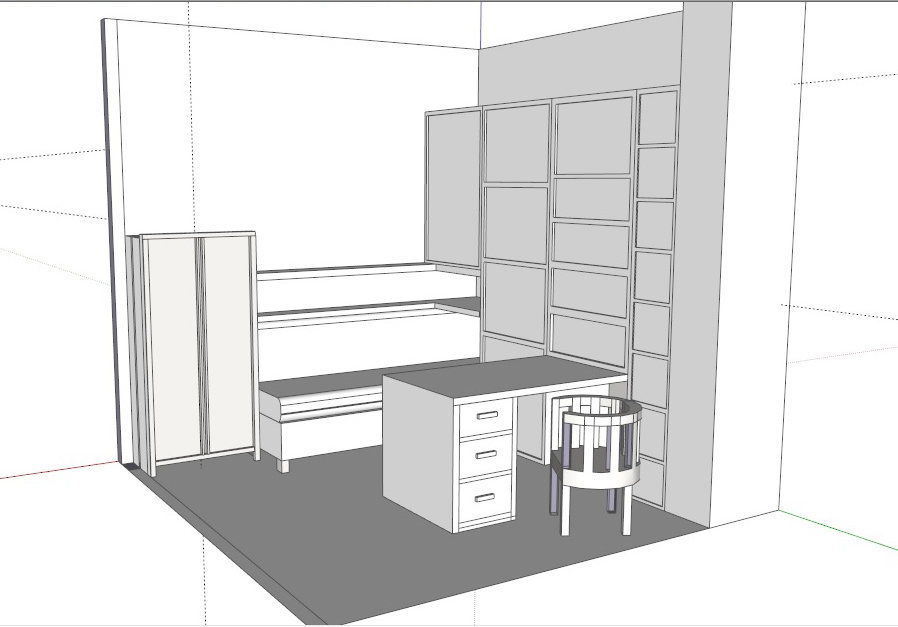 CAMERA PER UN RAGAZZO1-ADAMI E MASERA